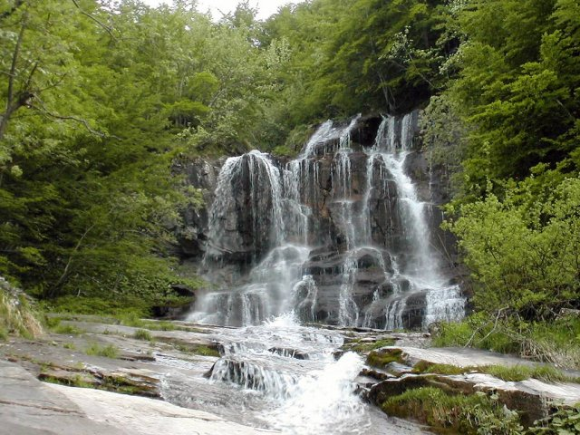 La celebre cascata del Doccione (nei pressi dei Taburri)